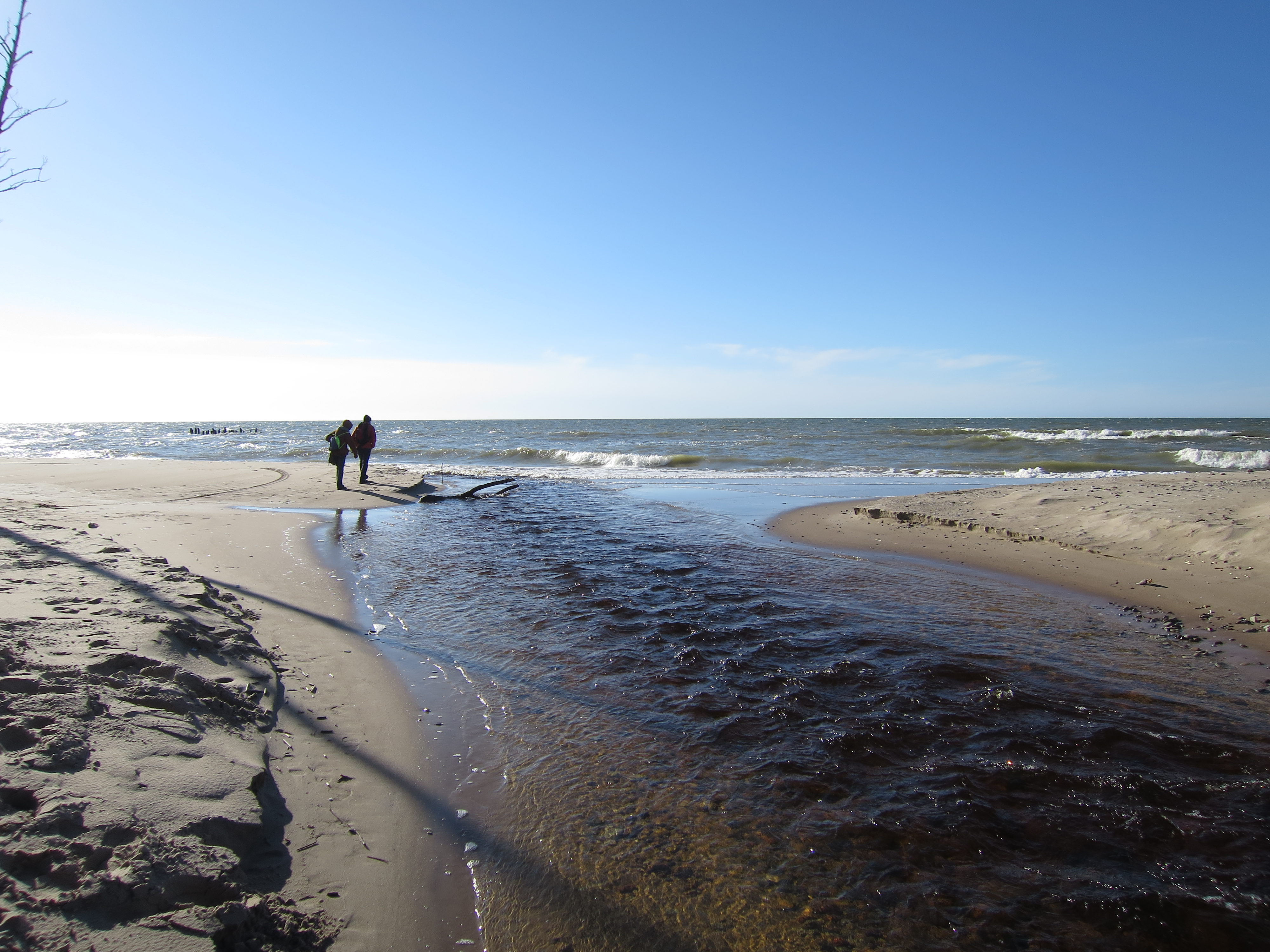 Cietokšņa kanāla ieteka jūrā